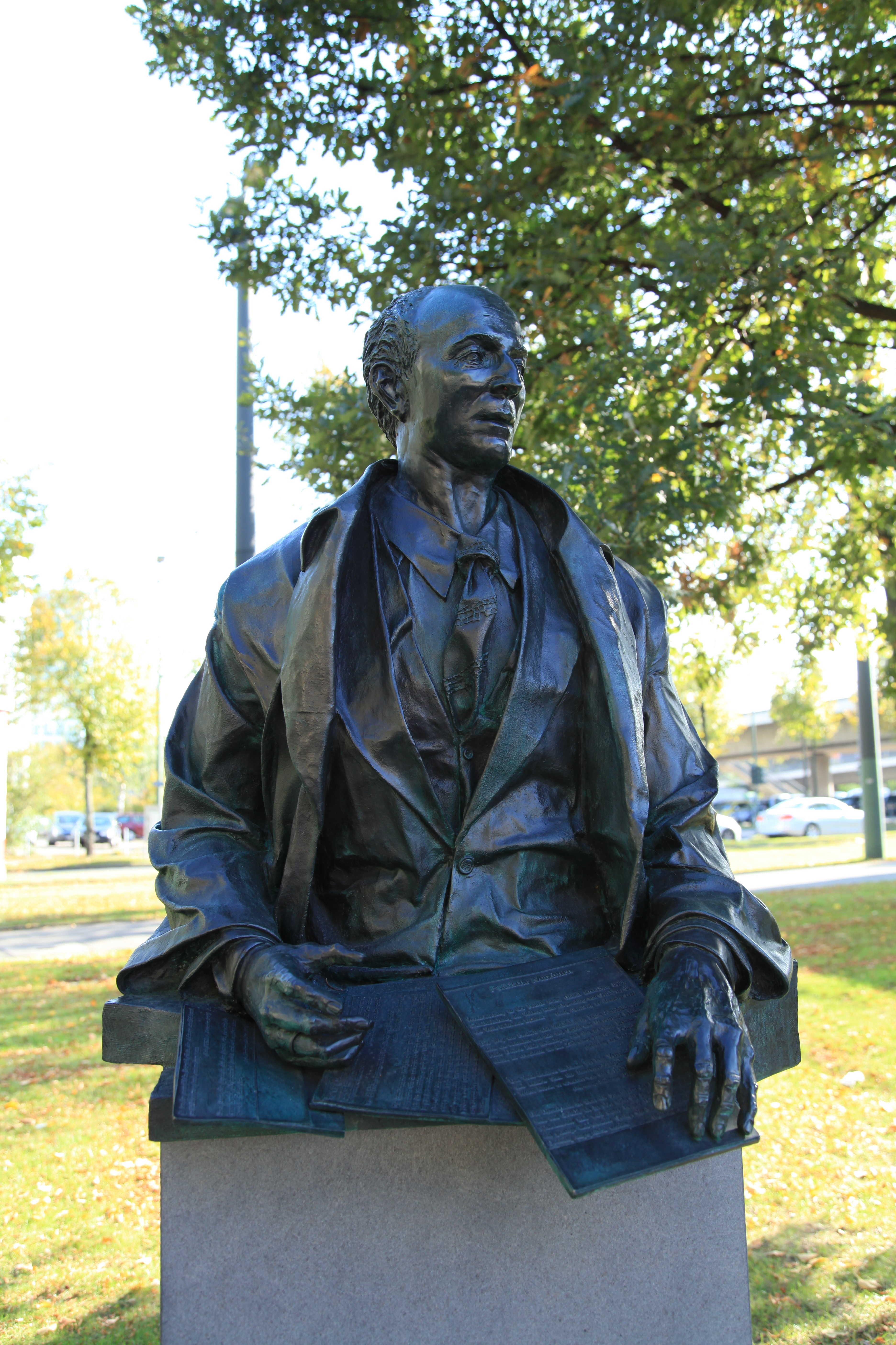 Karl-Arnold-Denkmal auf dem Johannes-Rau-Platz in Düsseldorf